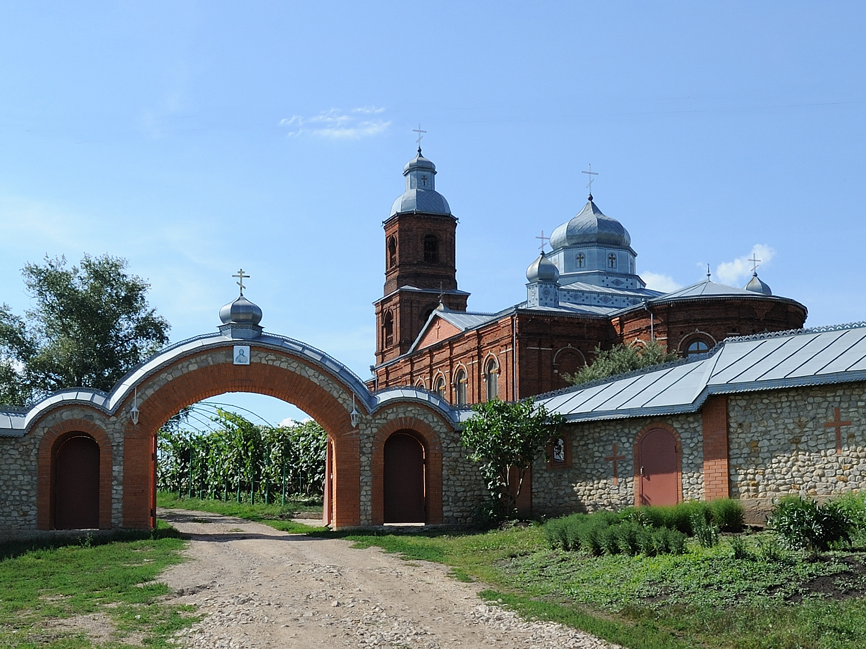 Храм Архангела Михаила [1]